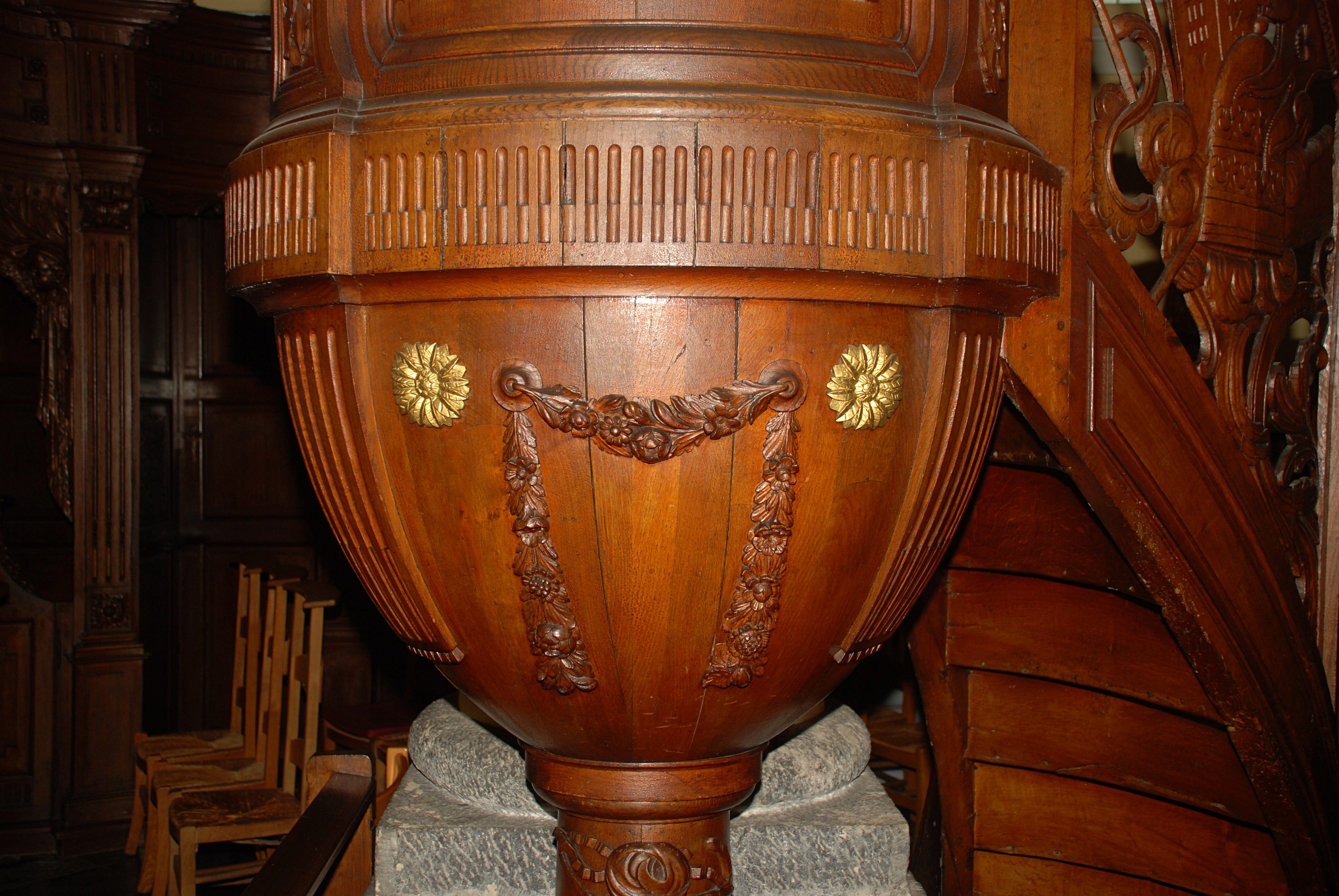 Belgique - Brabant wallon - Mont-Saint-Guibert - Église Saint-Guibert - la chaire de vérité